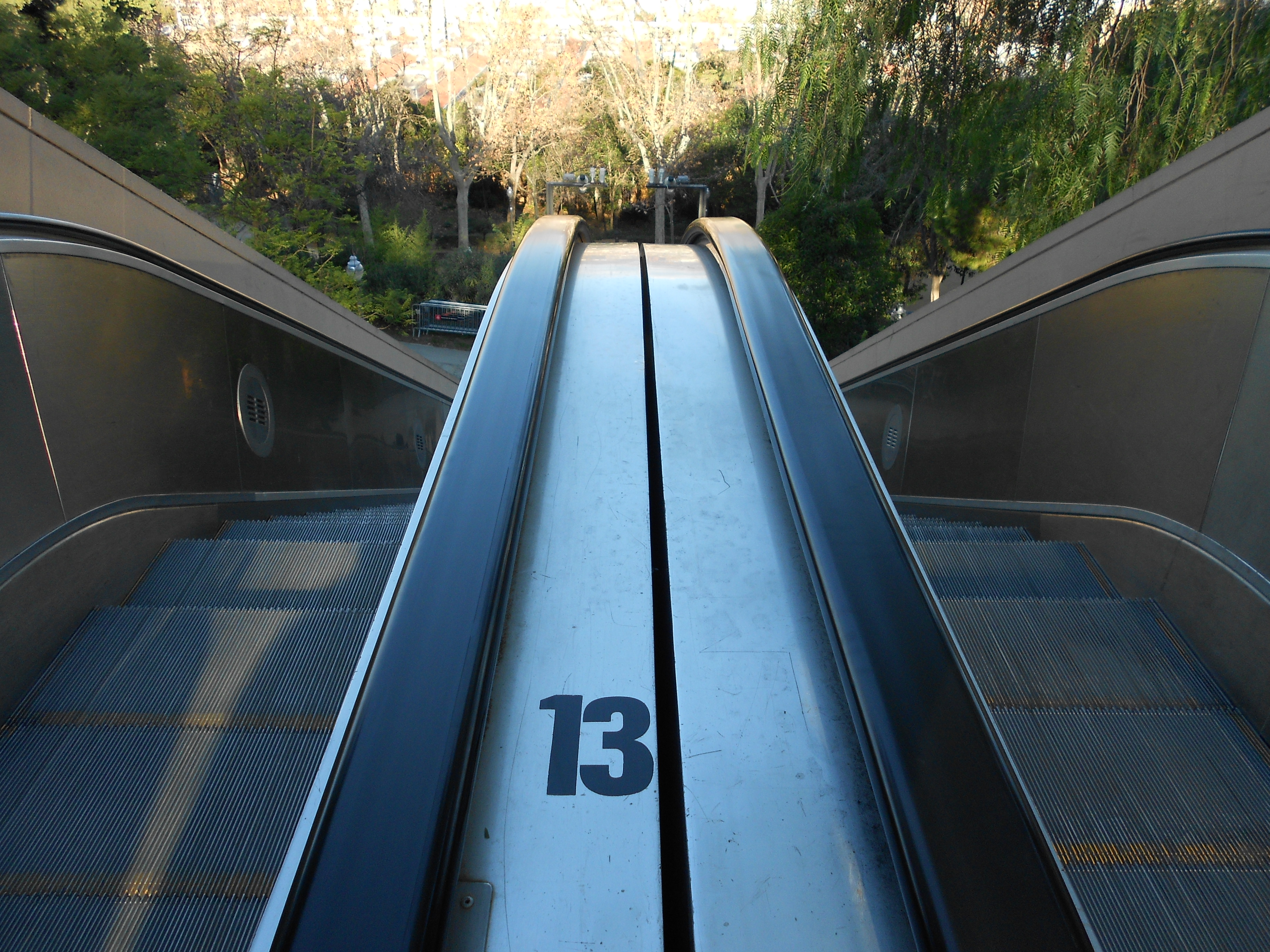 una scala mobile all'aperto a Barcellona (Barcelona, Espana)